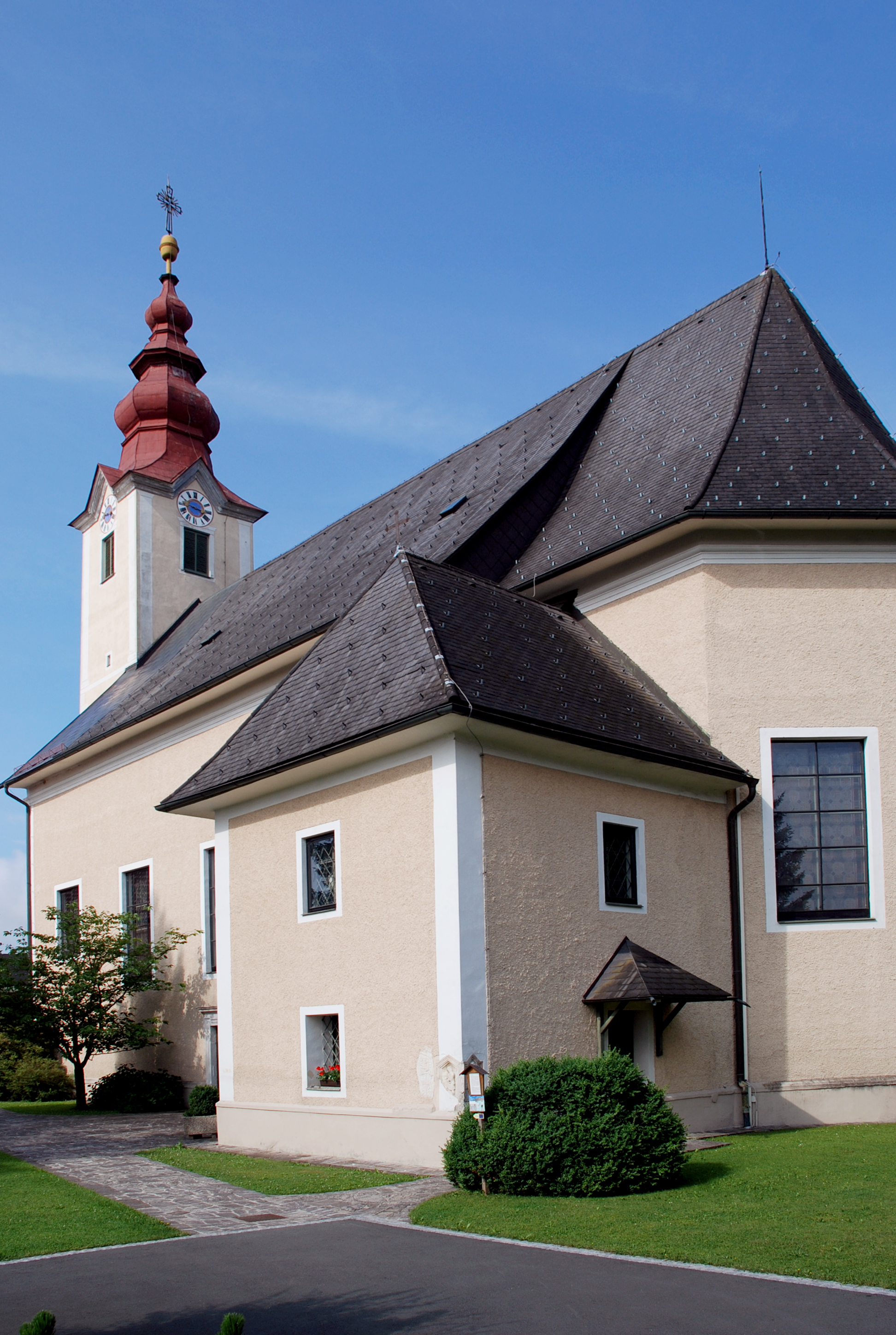 Sankt Martin im Sulmtal, Steiermark, Österreich: Pfarrkirche